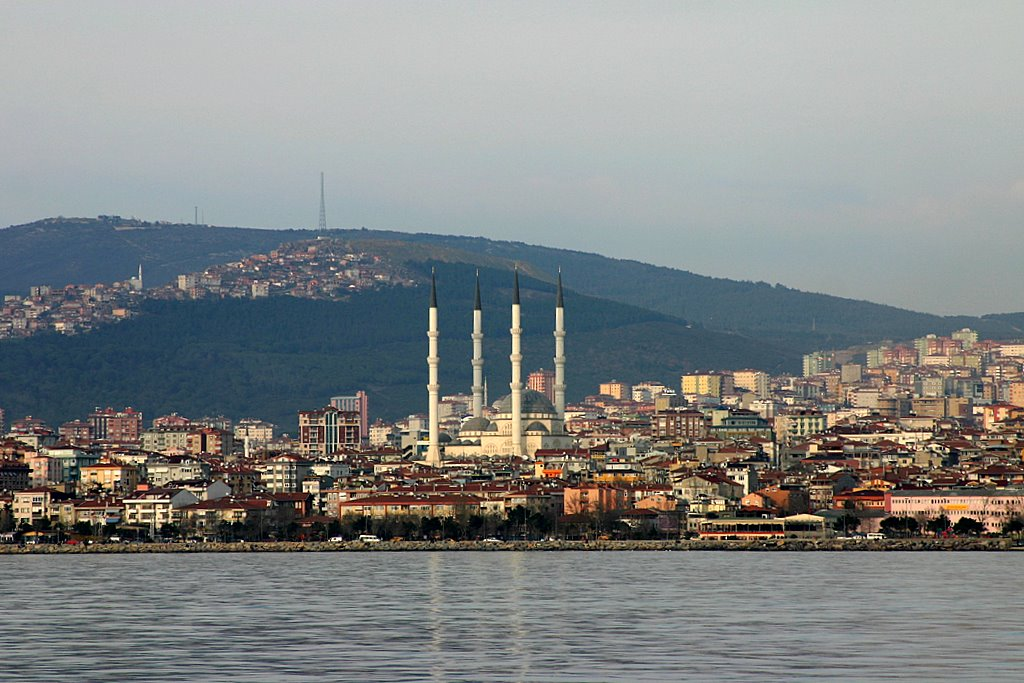 Yalı, Ş. Pl. Ahmet Altaş Cd. No:23, 34844 Maltepe/İstanbul, Turkey